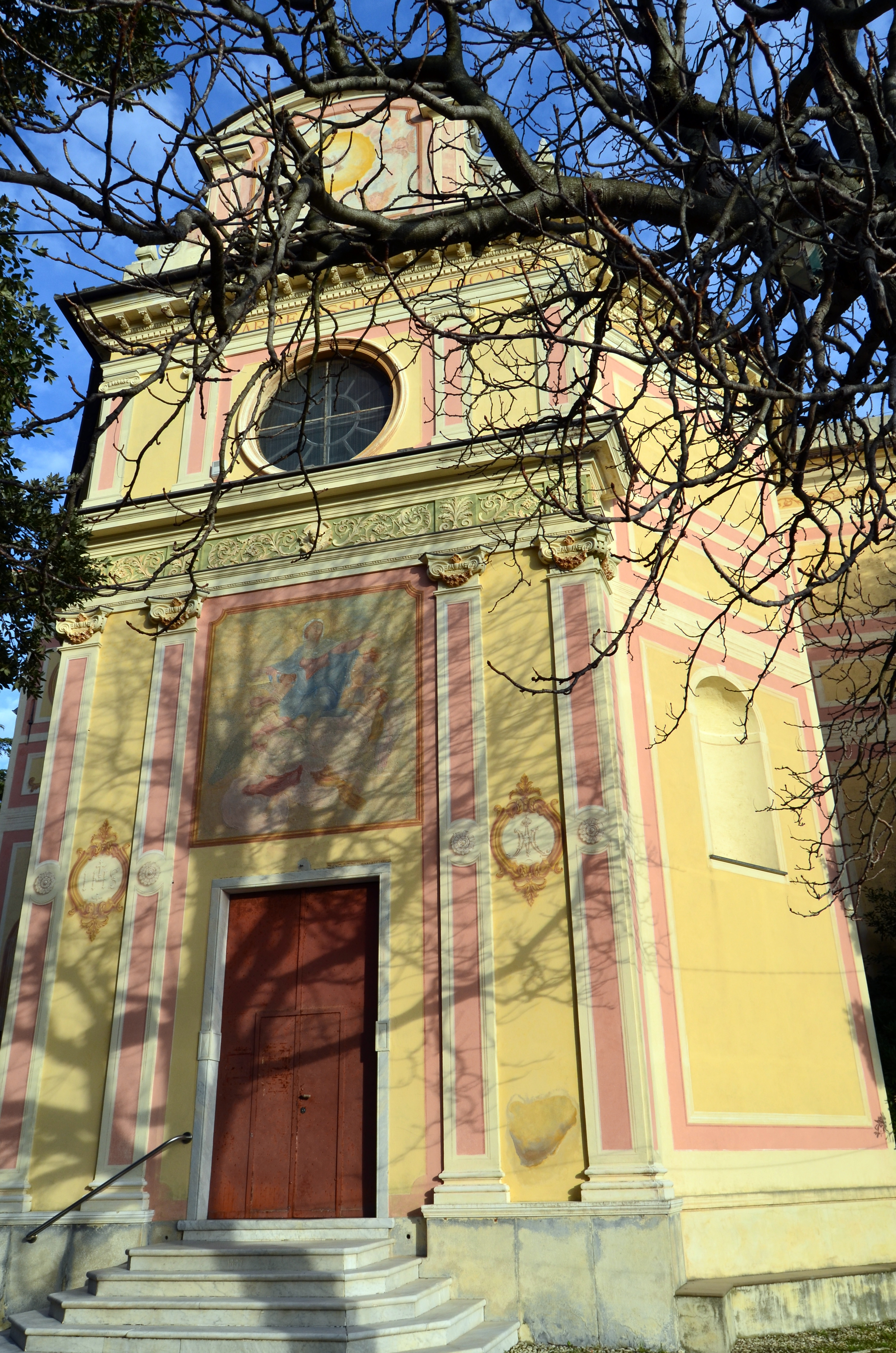 La chiesa di Santa Maria Assunta, Canepa, Sori, Liguria, Italia